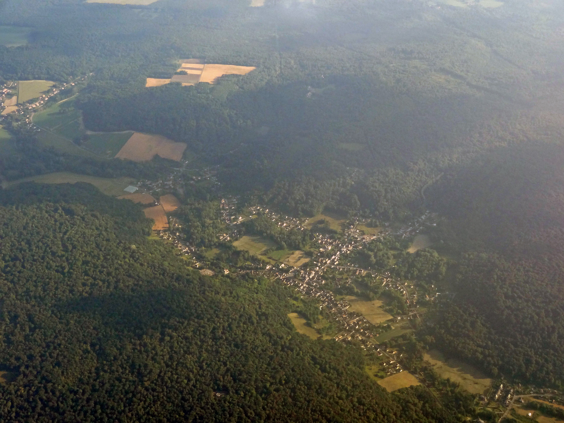 Vue aérienne de Cuise-la-Motte (Oise), France.